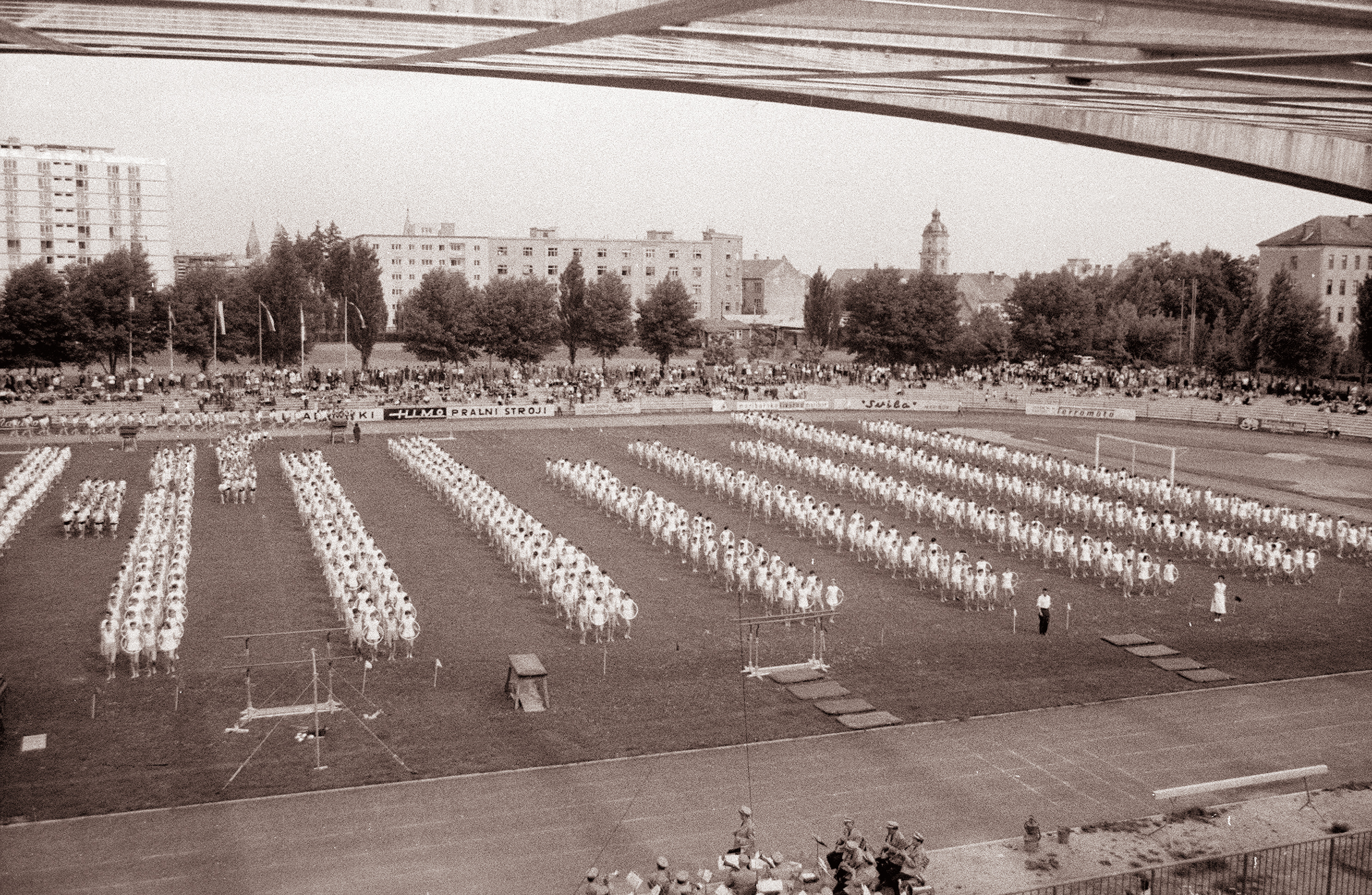 Festival mladosti v Mariboru